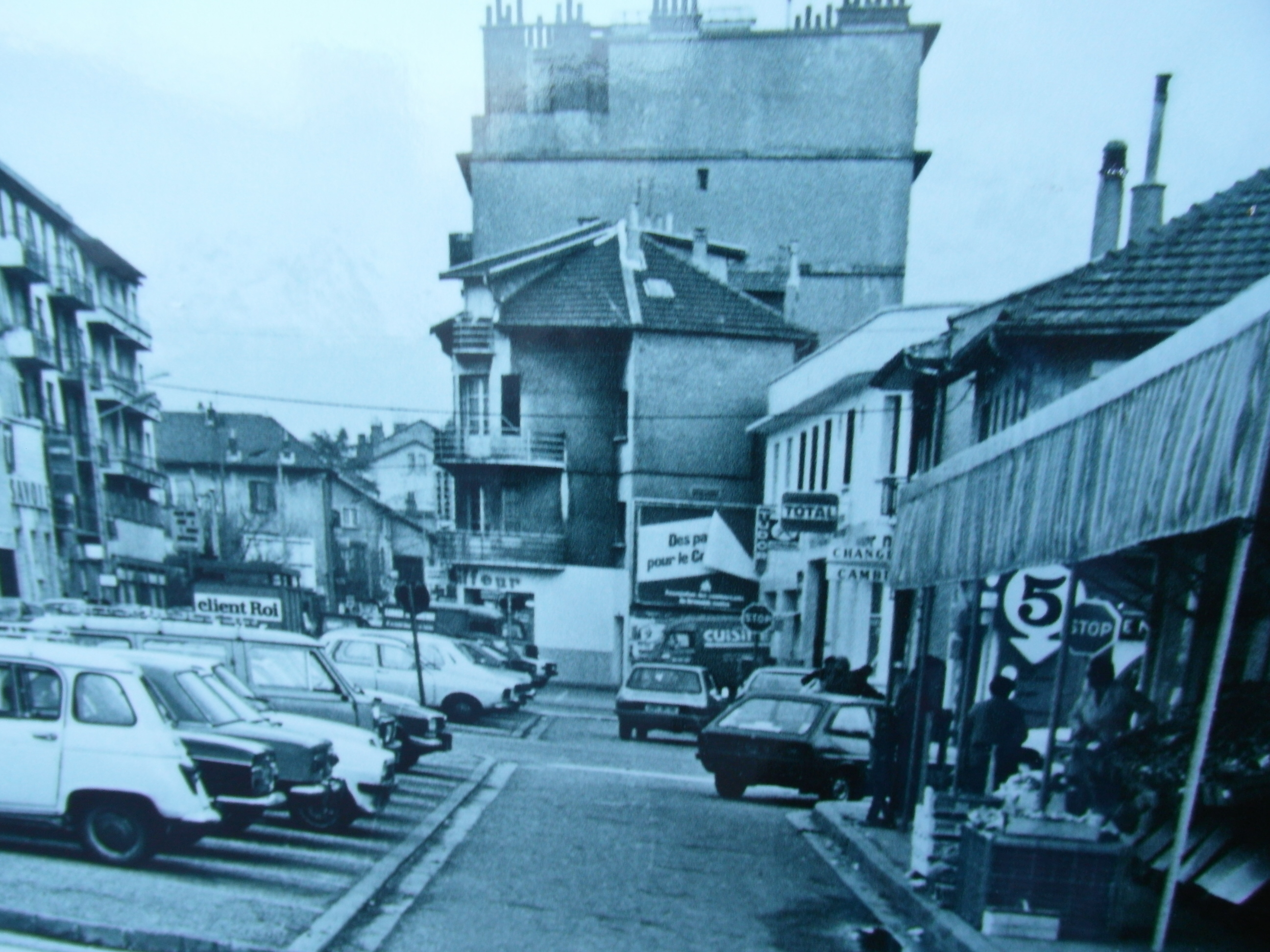 Place Louis Maisonnat en 1973